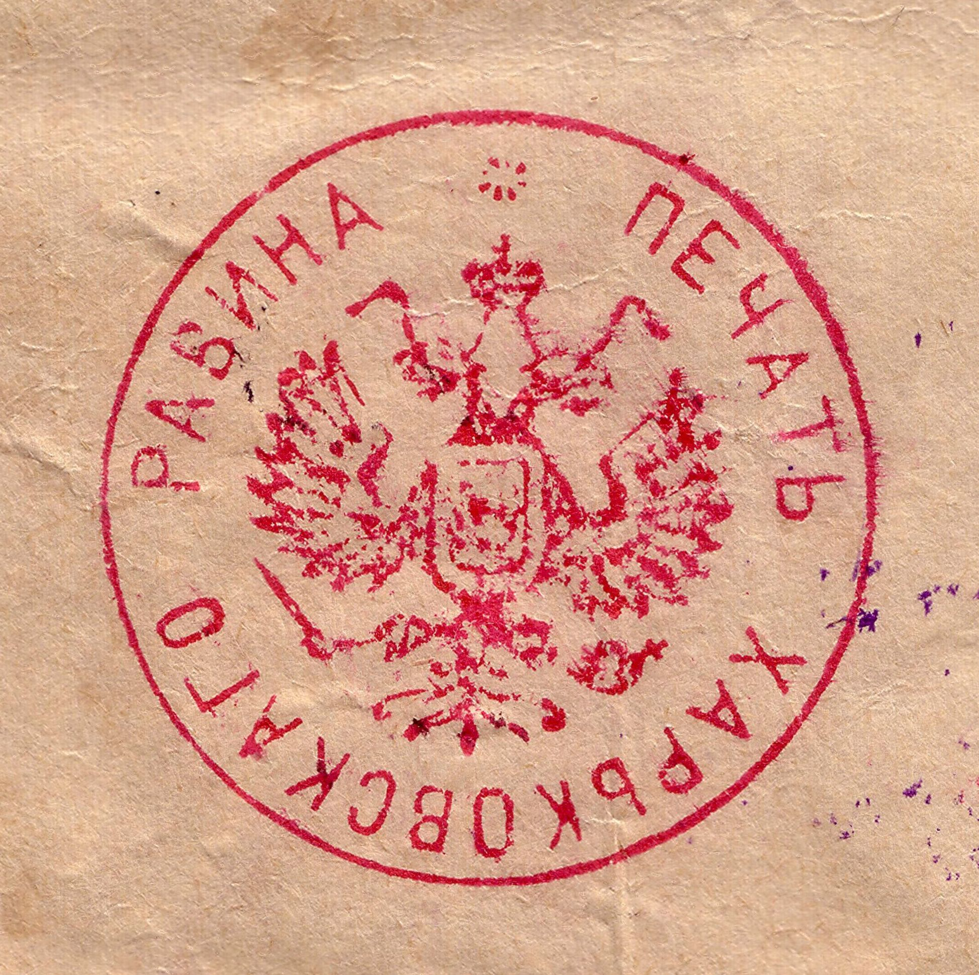 Печать рав(в)ина города Харькова. 1903 год.